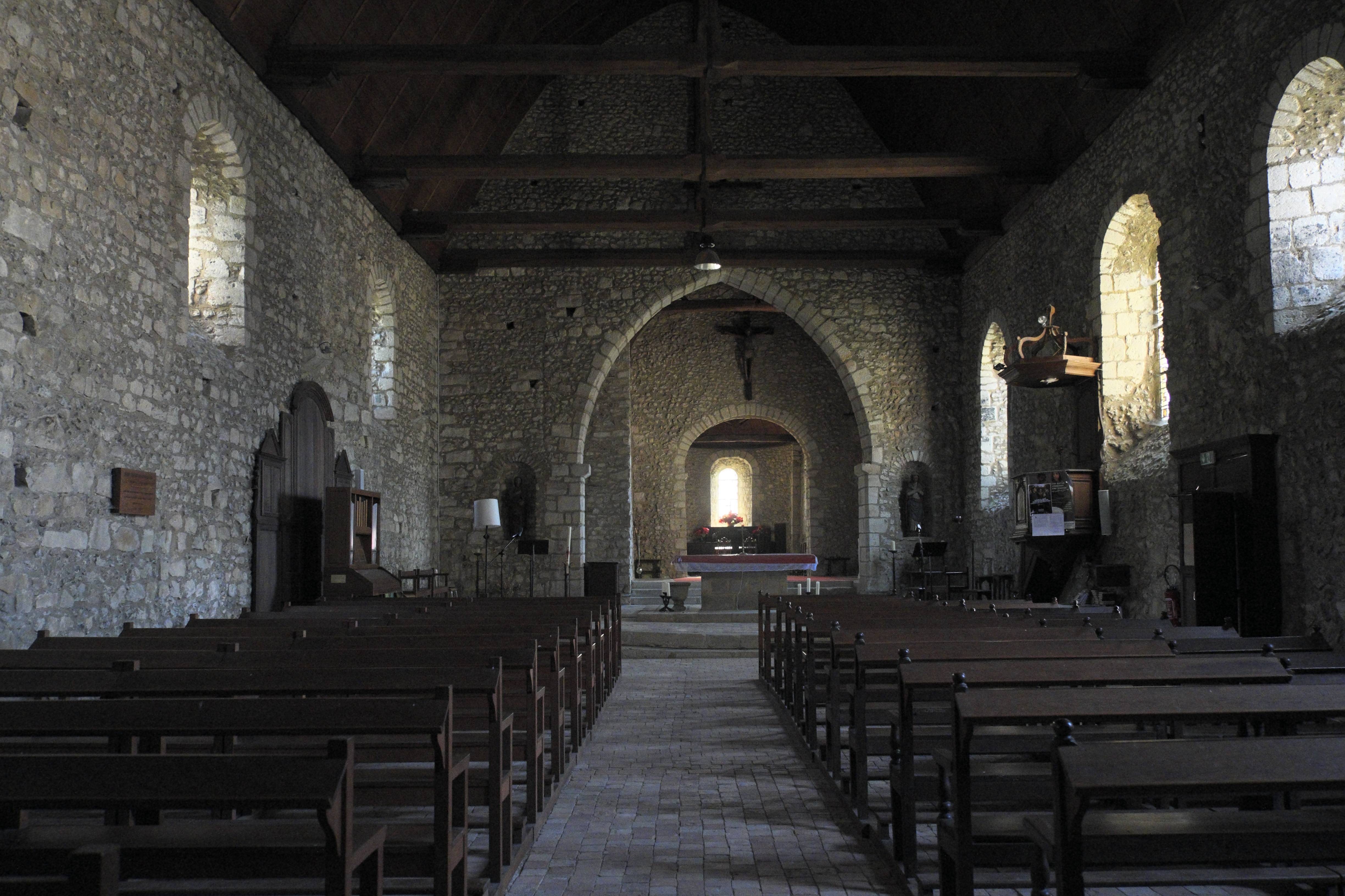 Katholische Kirche Saint-Pierre in Longvilliers im Département Yvelines (Region Île-de-France/Frankreich), Innenraum